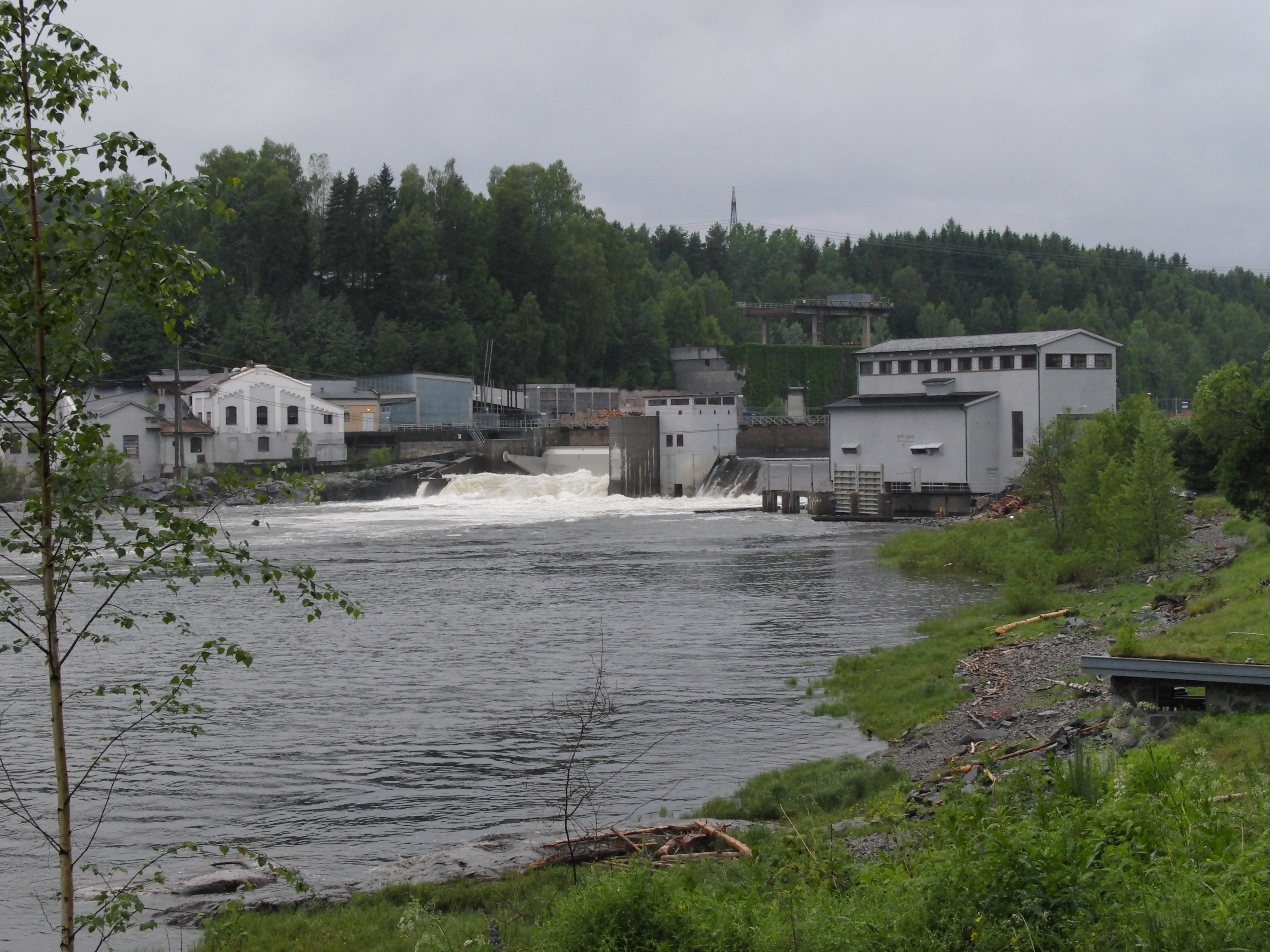 Hellefoss kraftstasjon